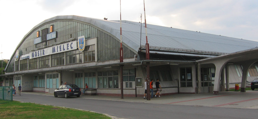 Hala sportowa w Mielcu.